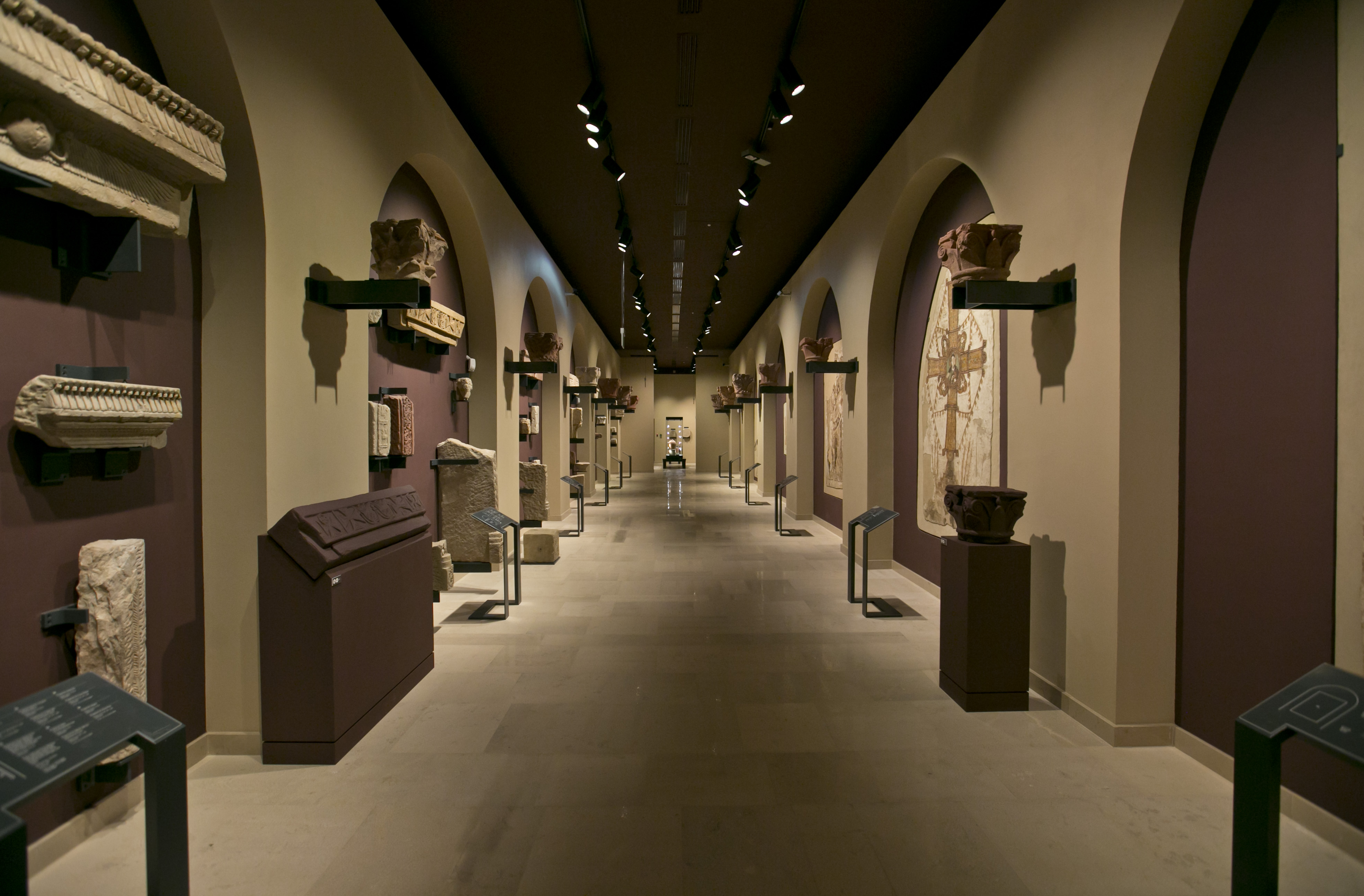 Muzeum Narodowe w Warszawie, Galeria Faras